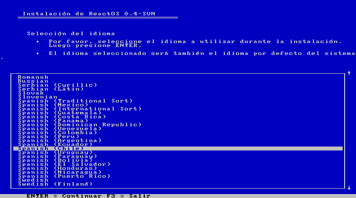 Pantalla de instalación de ReactOS (el sistema es multilingüe)